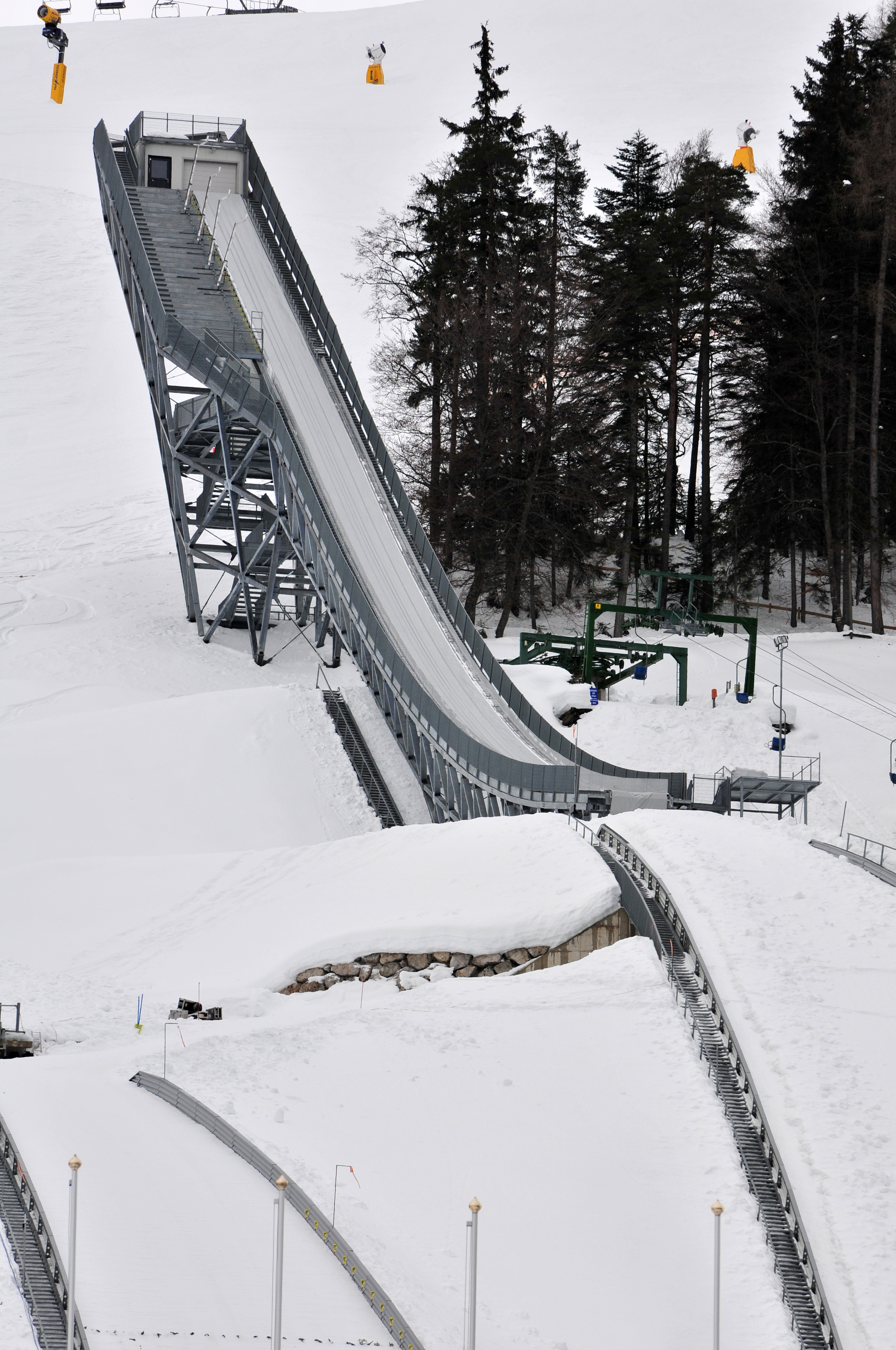 1. Jugendolympiade 2012, Seefeld in Tirol Erste Olympische Jugend- Winterspiele 201213. bis 22. Jänner in Innsbruck Dieses Foto wurde durch die Unterstützung von Wikimedia Österreich und die Twoonix Software GmbH ermöglicht.